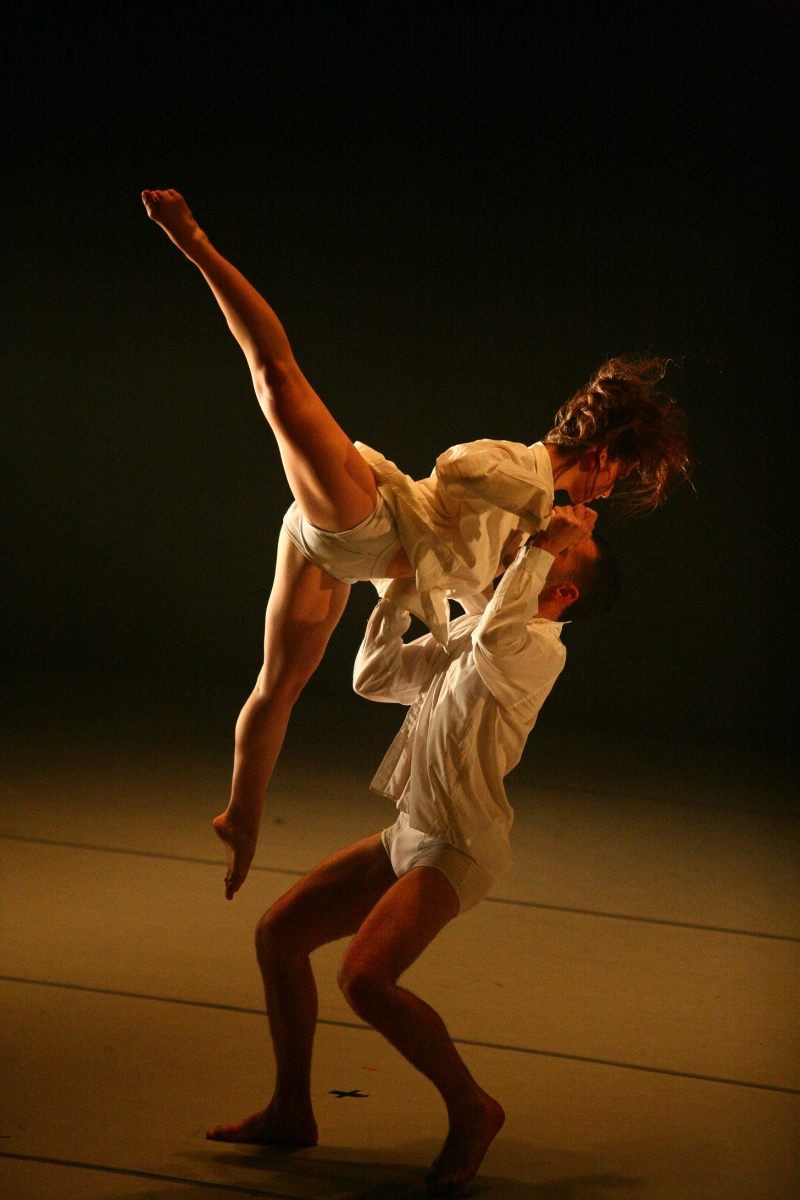 להקת מחולה בהופעה. צילום: לואיז גרין